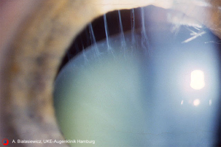 Linsemluxation beim Menschen Die Linse ist nach unten verlagert, in der Pupille sind die Ziliarkörperfasern oben sichtbar.